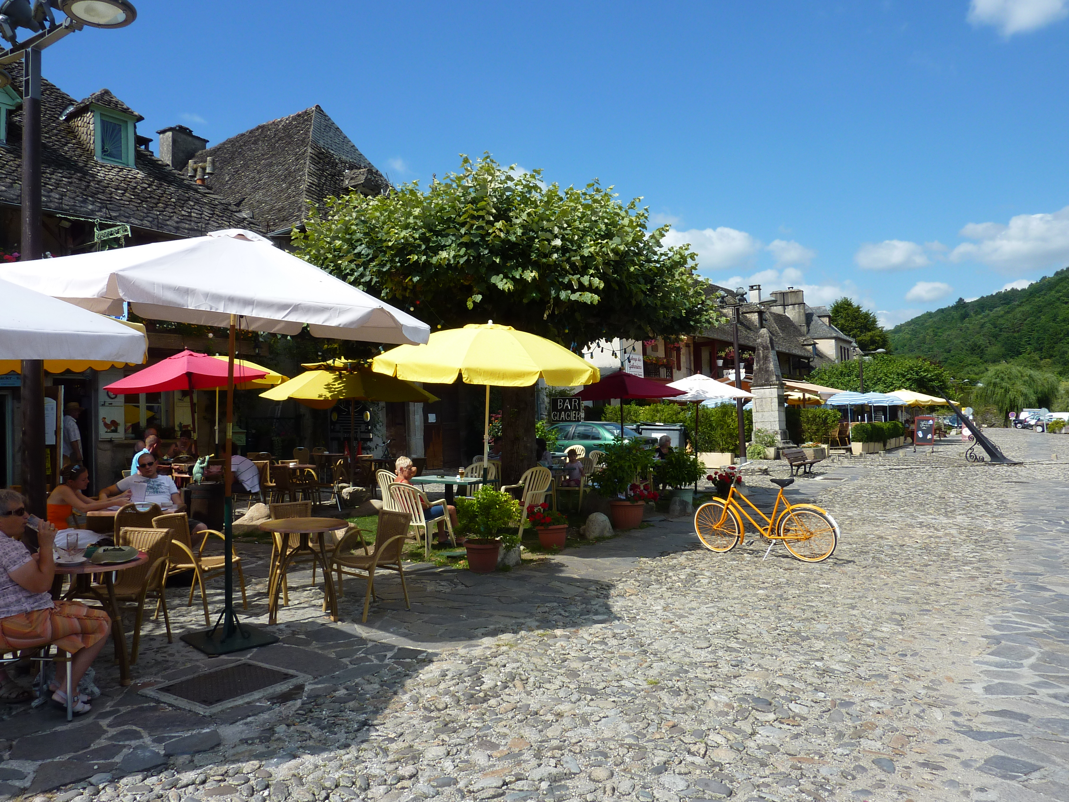 Argentat: Les quais de la Dordogne